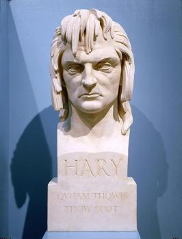 Estatua de Blind Harry